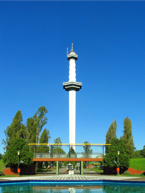 Entrada principal del Parque de Diversiones de la Ciudad de Buenos Aires (Ex-Interama)